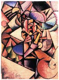 Scan eines Bildes des Malers Hanns Bolz (1885-1918)